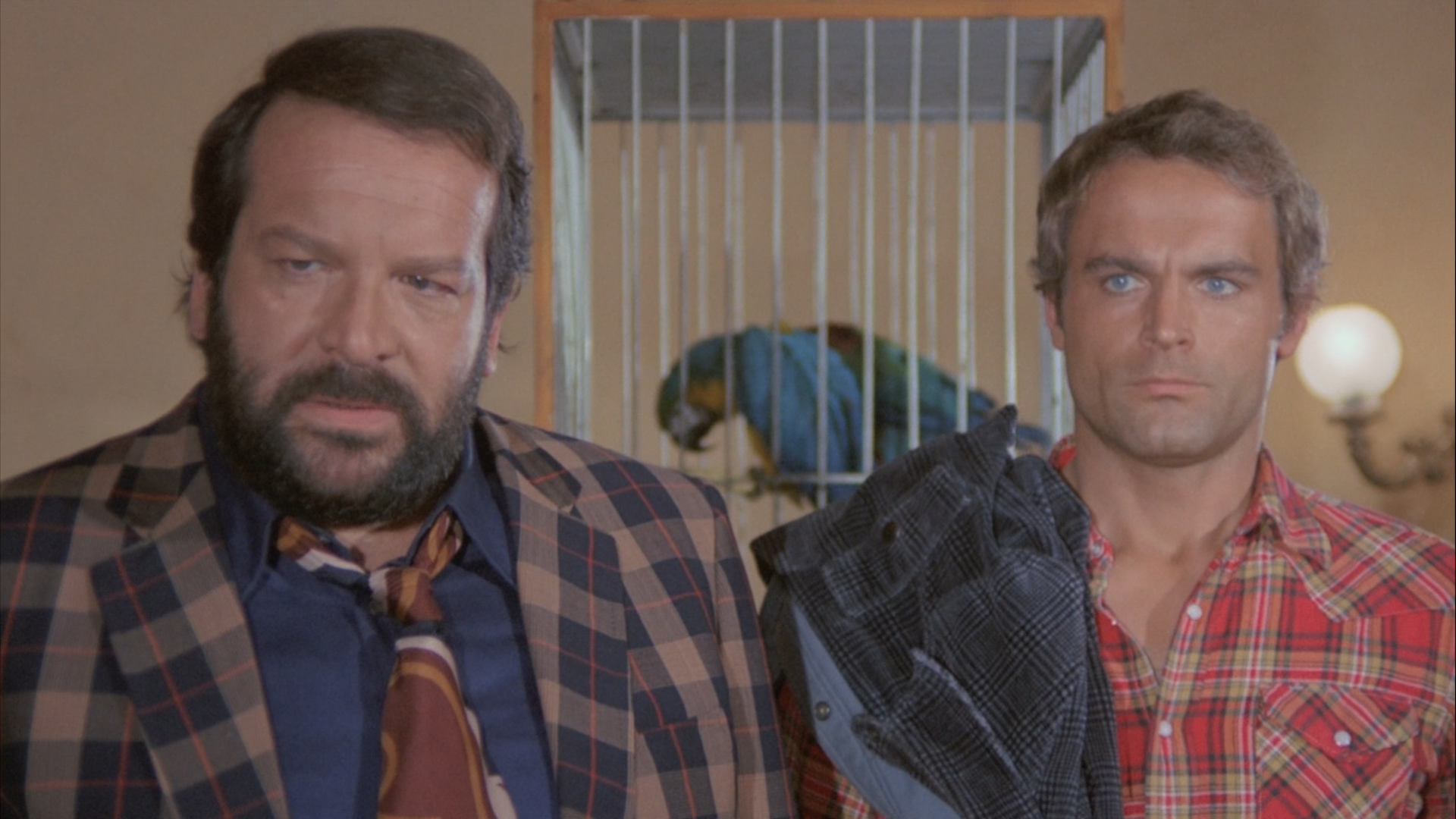 Schermata del film ...altrimenti ci arrabbiamo!